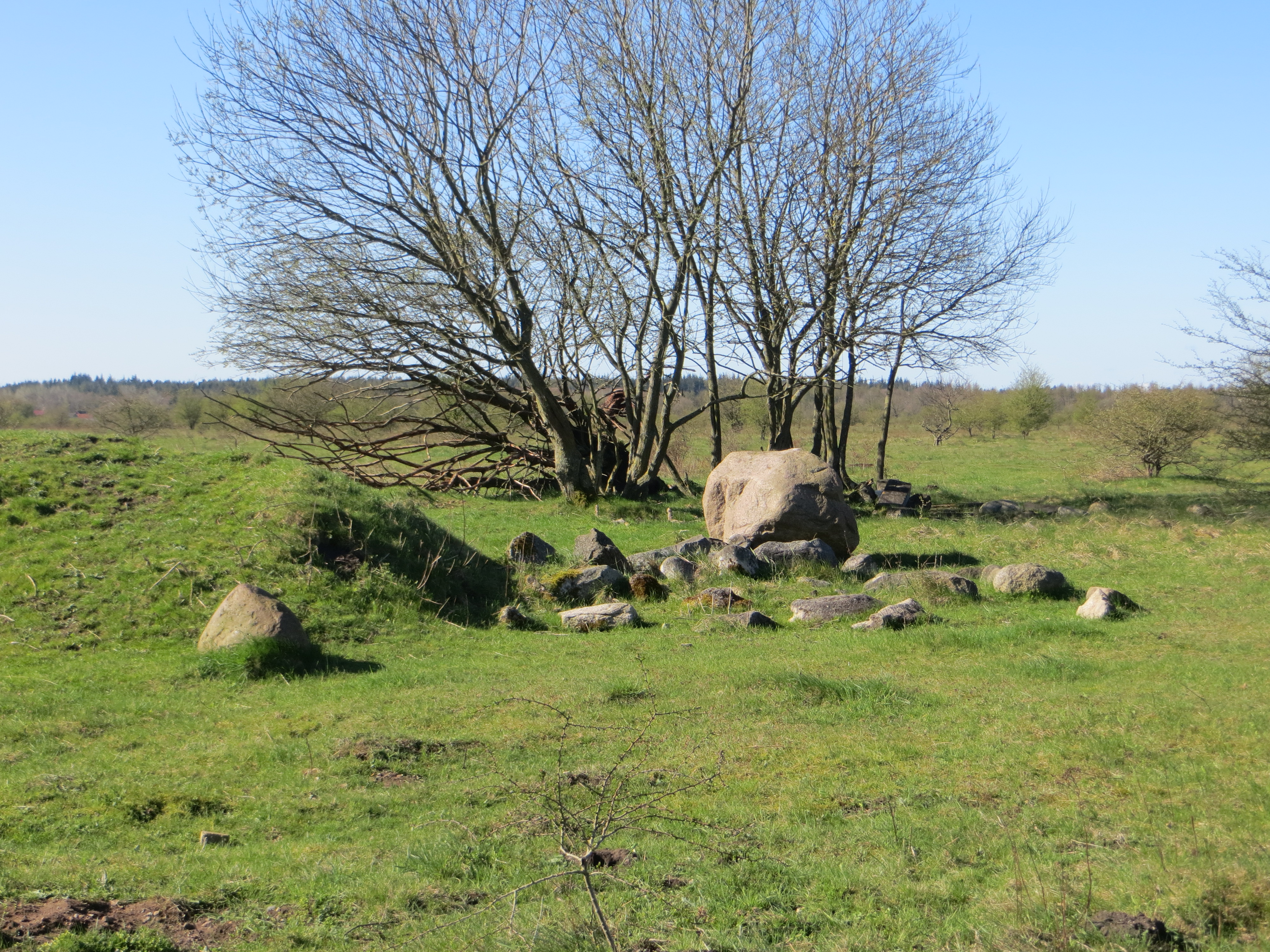 Stiftungsland Schäferhaus Süd beim Flugplatz